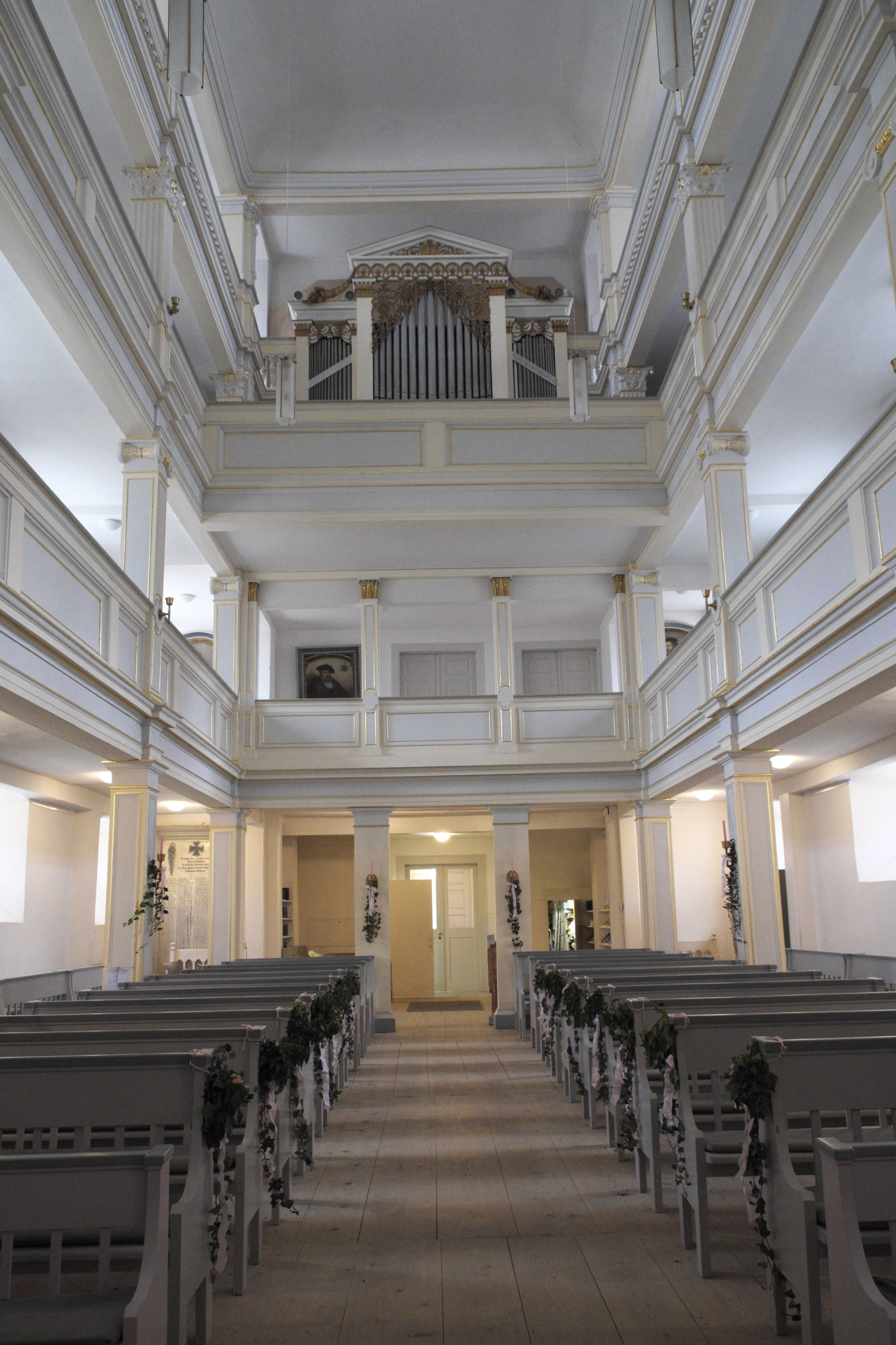 Jakobskirche in Weimar in Thüringen/Deutschland, Innenraum mit Blick zum Chor